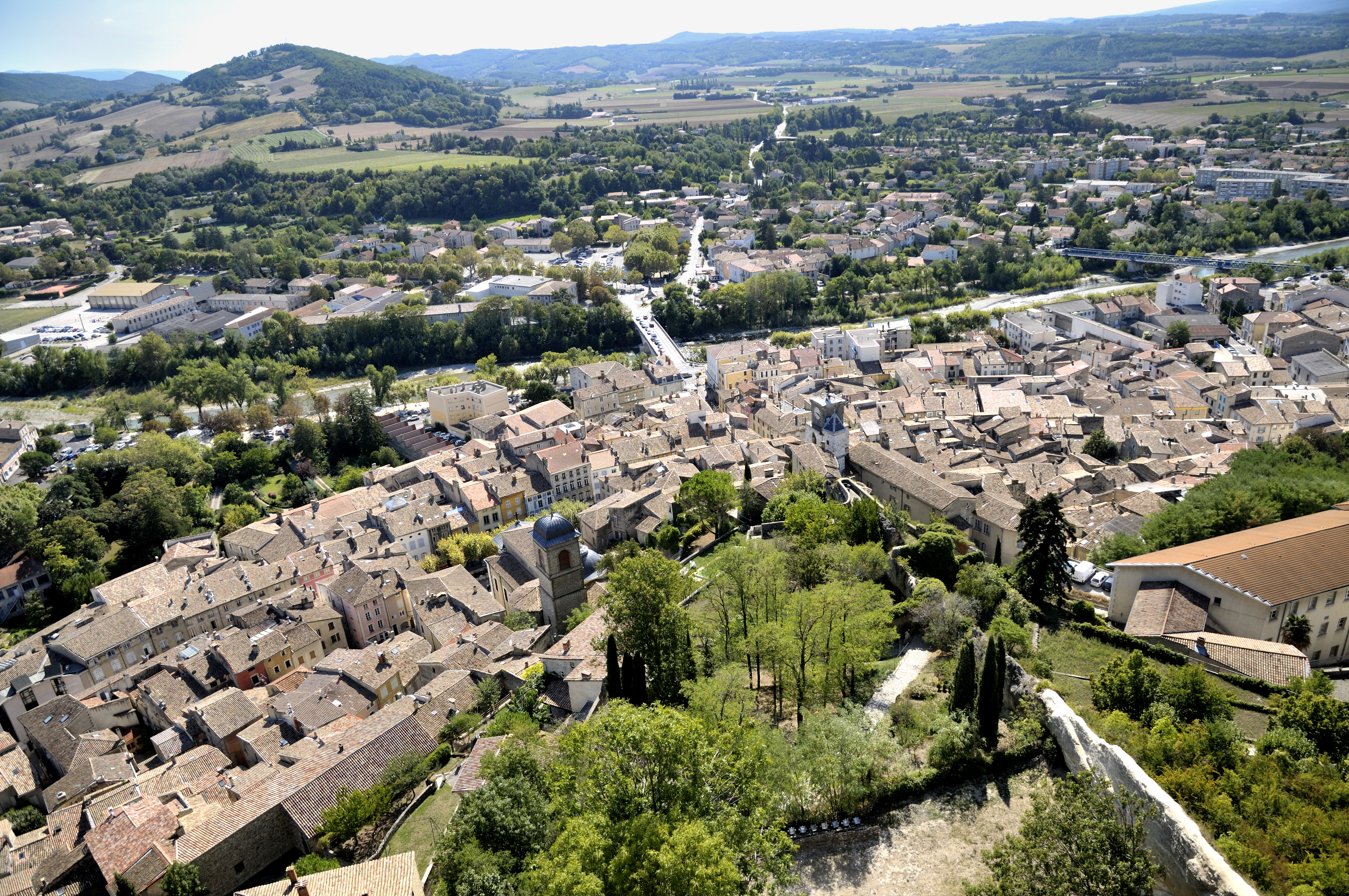 vue sur la ville de Crest depuis son donjon